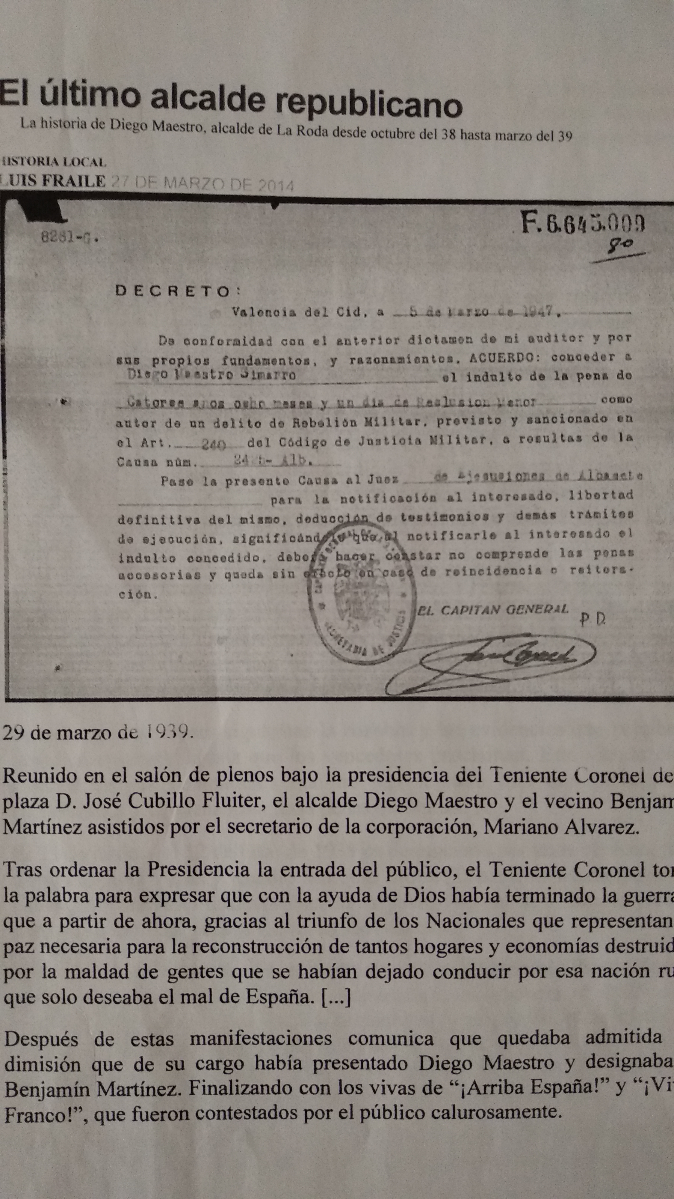 Decreto de Diego Maestro Simarro.